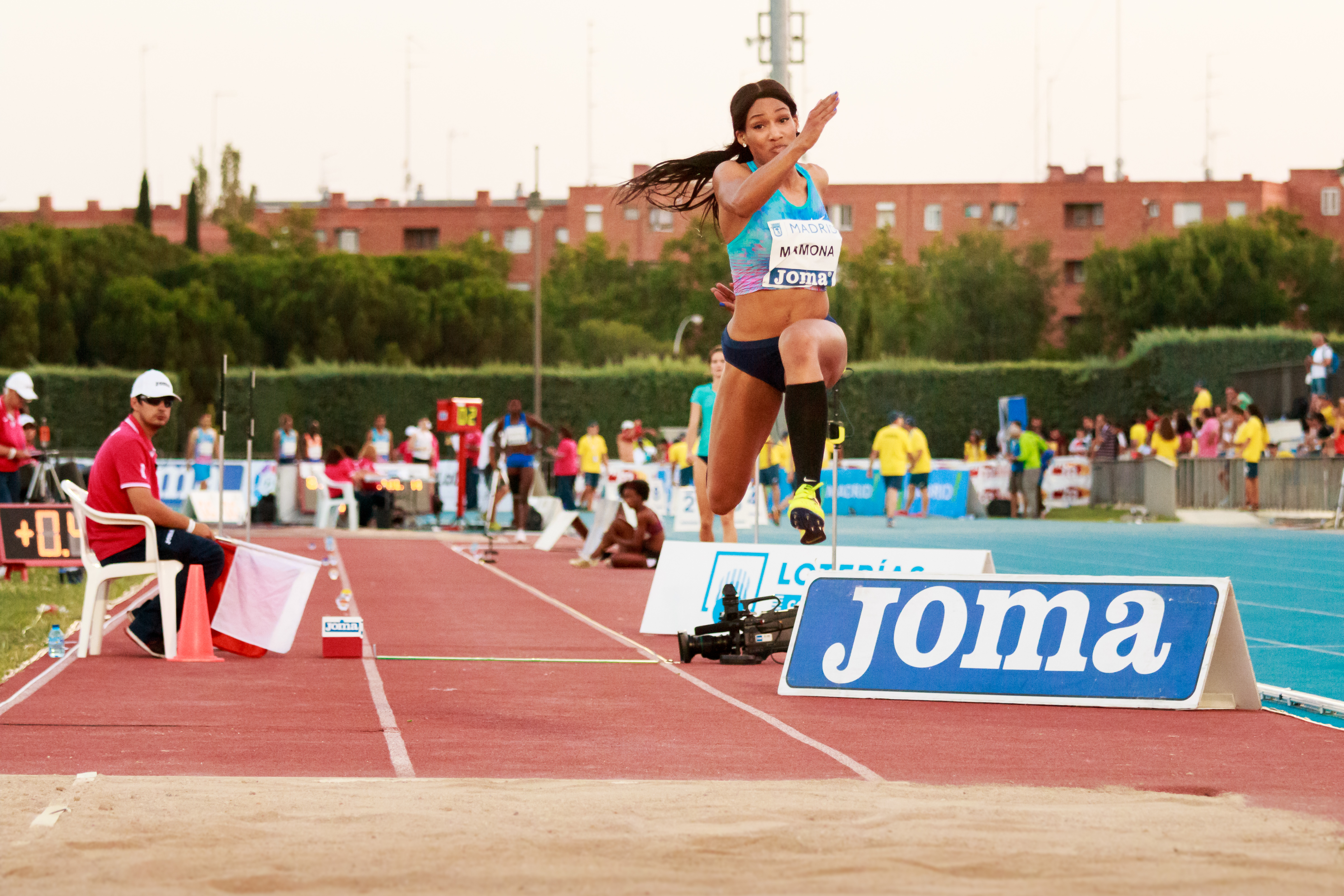 Patrícia Mamona (POR). Triple salto. IAAF World Challenge. Meeting Madrid 2017. Moratalaz, Madrid.